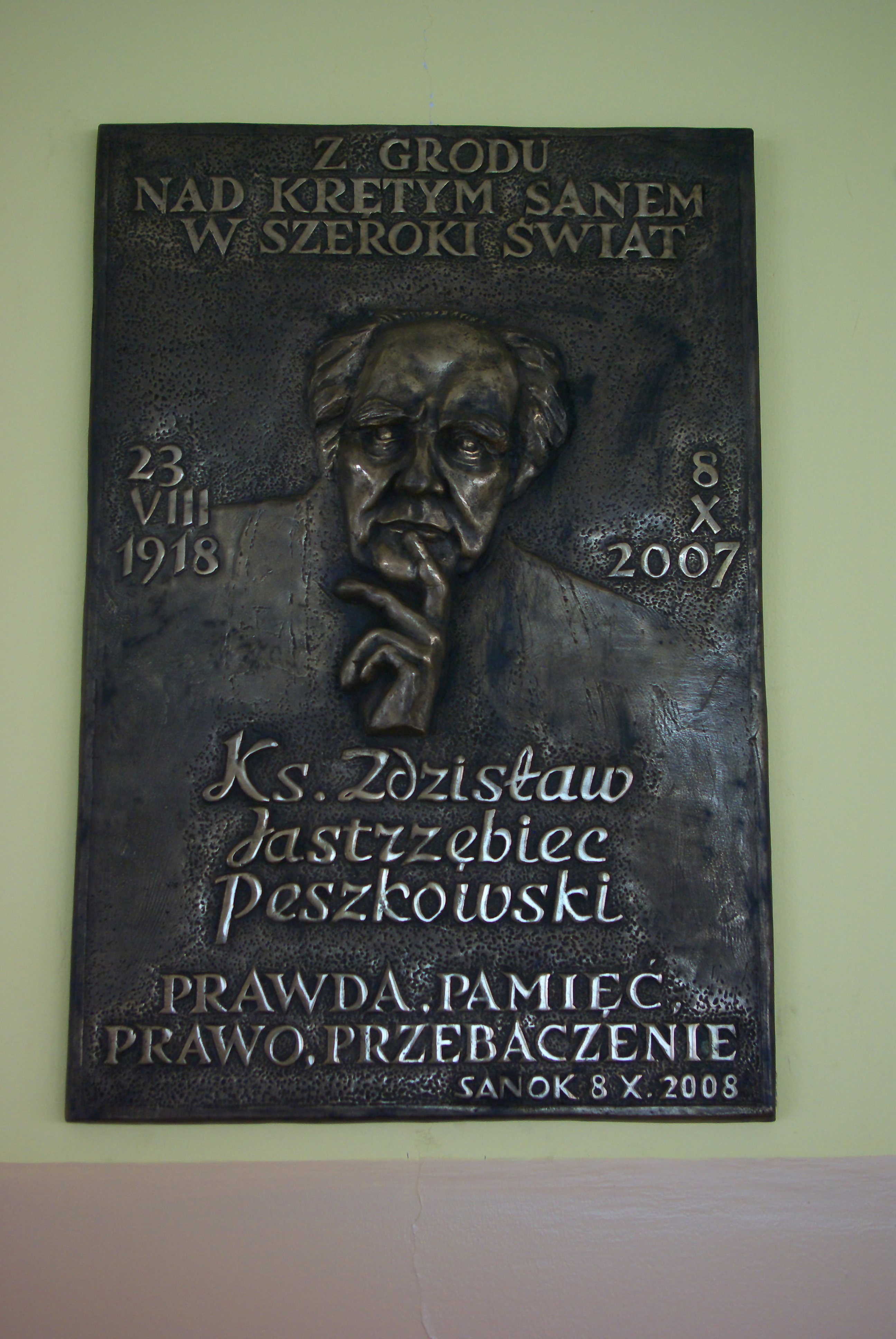 Szkoła Podstawowa nr 4 im. ks. Zdzisława Jastrzębiec Peszkowskiego w Sanoku. Tablica upamiętniająca patrona